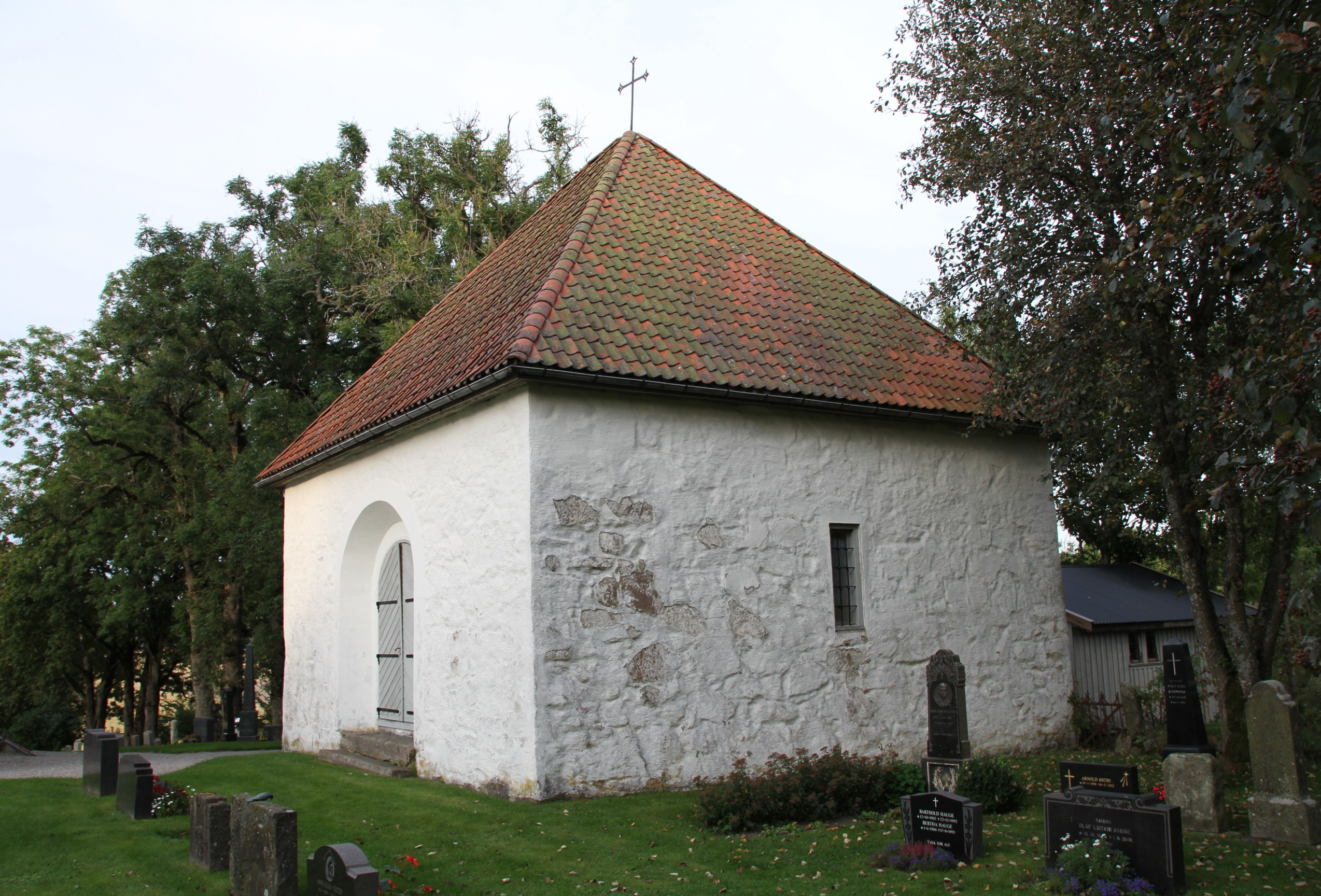 Skjeberg middelalderkirke i Sarpsborg kommune